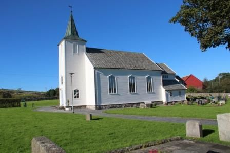 Førre kirke. Foto: Bertha Aarø, fra Riksantikvarens Kulturminensøk.